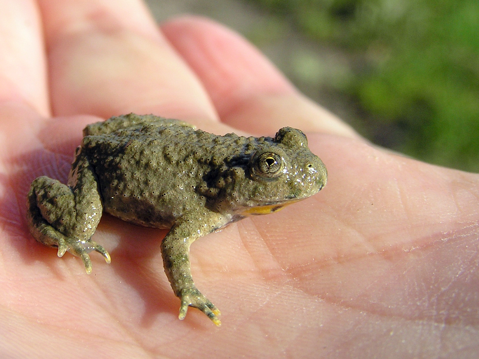 Bombina variegata - Gelbbauchunke